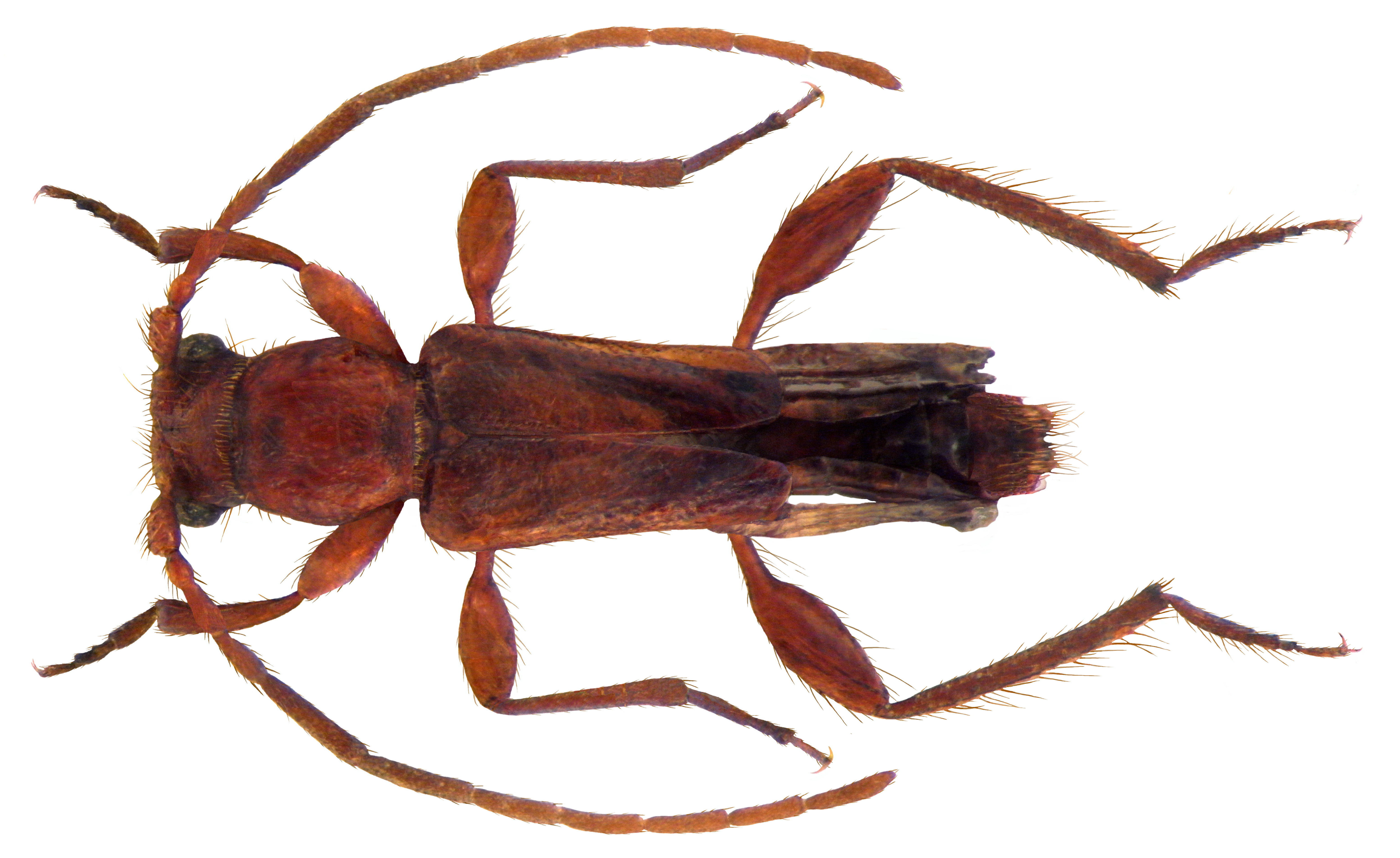 Familie: Cerambycidae Groesse; 4-7 mm Verbreitung: Mittelmeergebiet, wird nach Mittel- und Nordeuropa z.B. mit Weidenkörben eingeschleppt. Gefunden in Deutschland. Ökologie: Entwicklung in Laubholz det. A.Weigel Photo: U.Schmidt, 2010